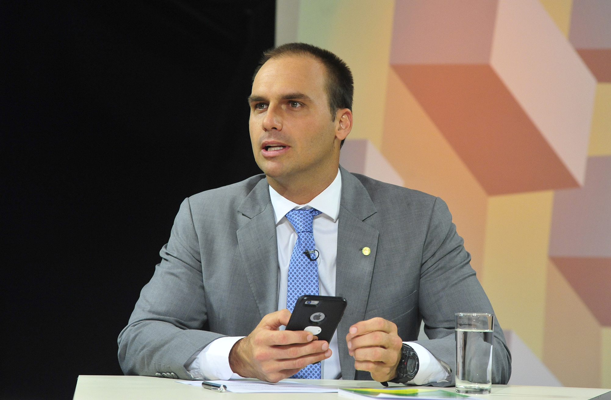 O Expressão Nacional desta semana discute sobre Autonomia da Polícia Federal. Entre as propostas, há discussões sobre estrutura de carreira e autonomias funcional, orçamentária e financeira convidado, dep. Eduardo Bolsonaro (PSC-SP). Data: 08/08/2016